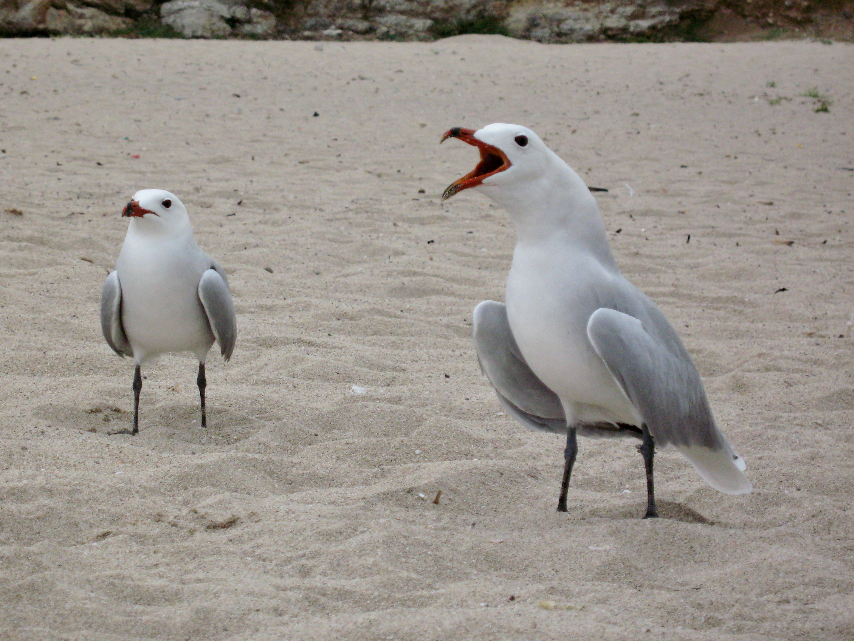 Korallenmöwen (Larus audouinii) an der Cala Torta, Gemeinde Artà, Mallorca, Spanien